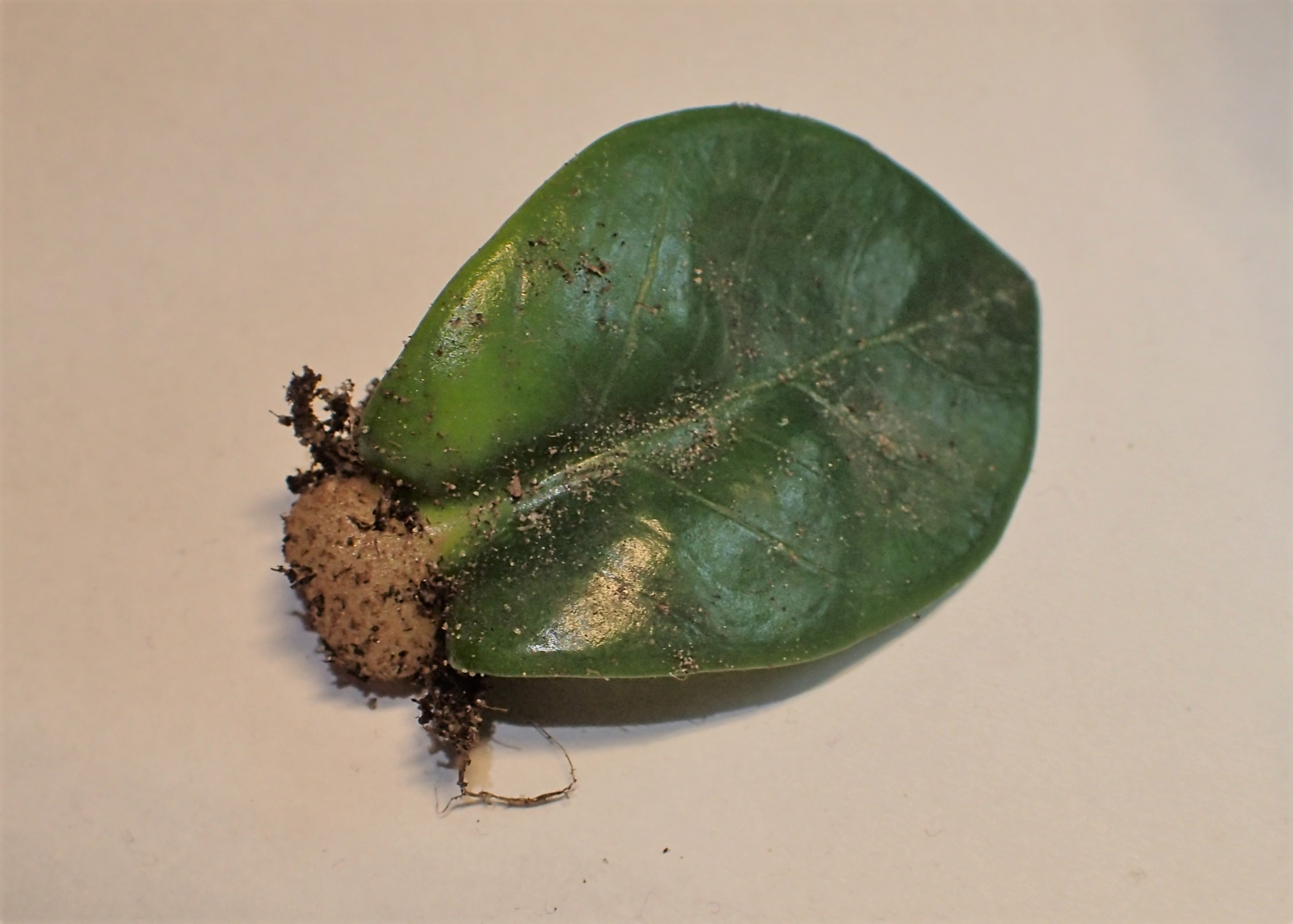 Zamioculcas zamiifolia - leaflet with new rhizome - in Szczecin, NW Poland